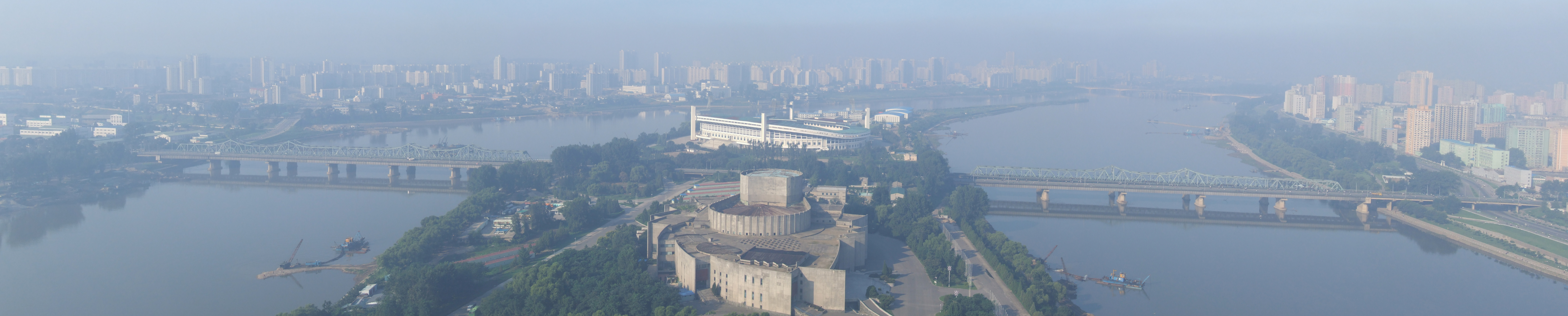 Die Yanggak-Brücke in Pjöngjang